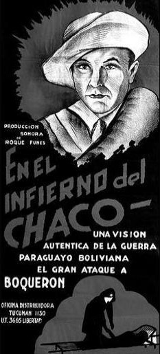 Póster de En el infierno del chaco